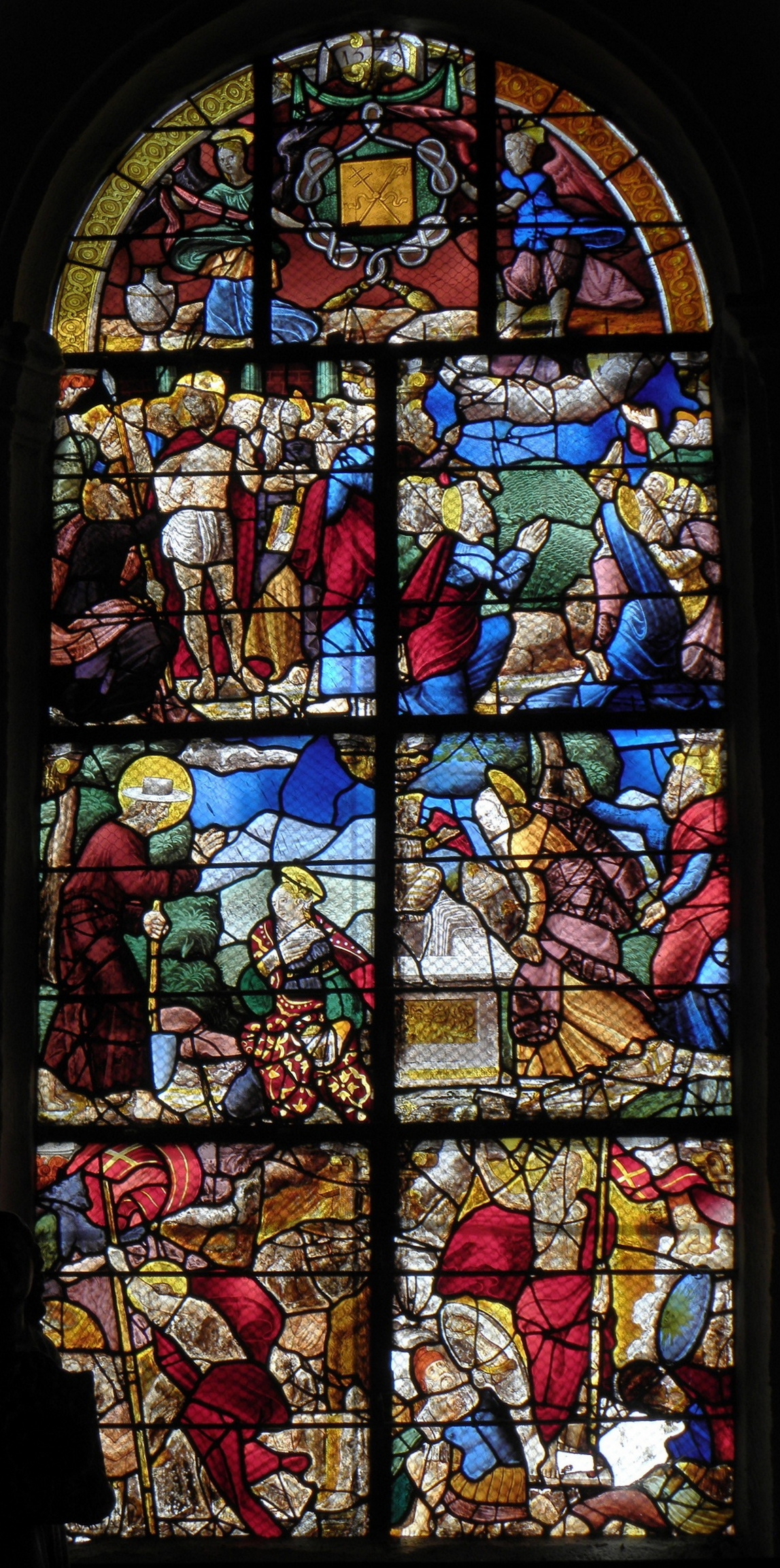 Baie 02 de l'église Notre-Dame et Saint-Bieuzy de Bieuzy (56).